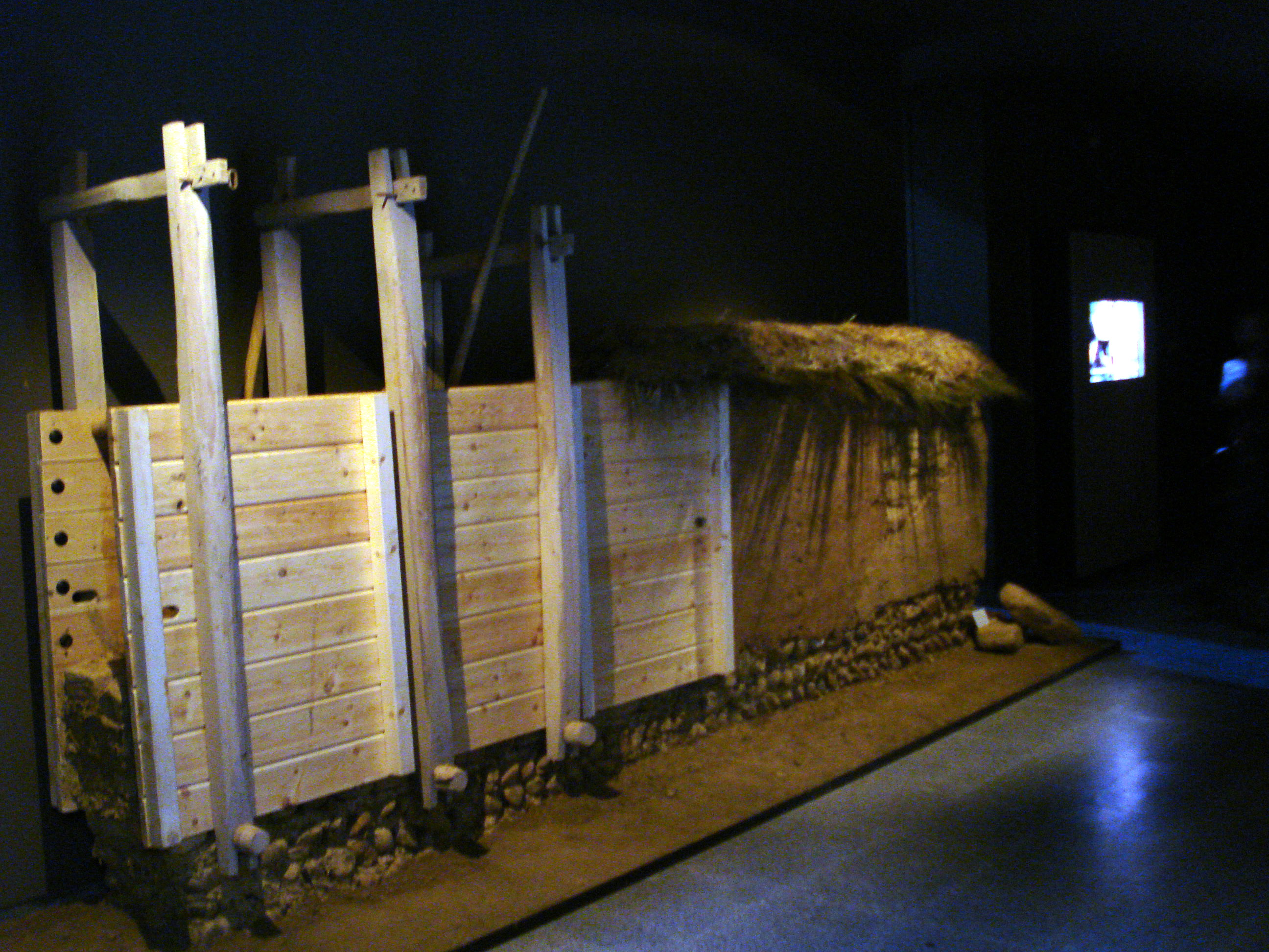 Construcción de Tapial en el Museo Etnográfico Provincial de León